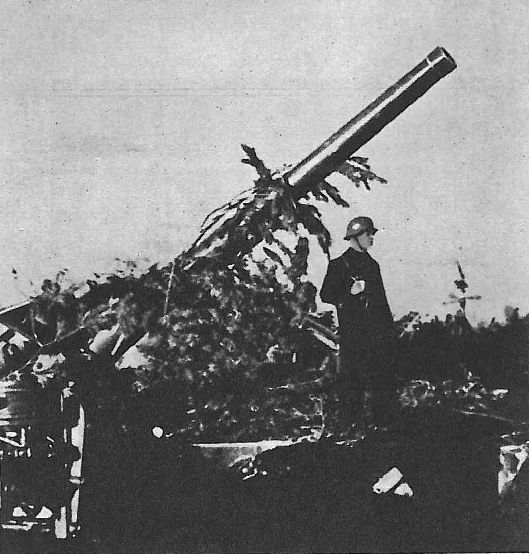 Działo plot. Schneider kal. 75 mm wz. 1922/1924 na Helu w 1939 r.